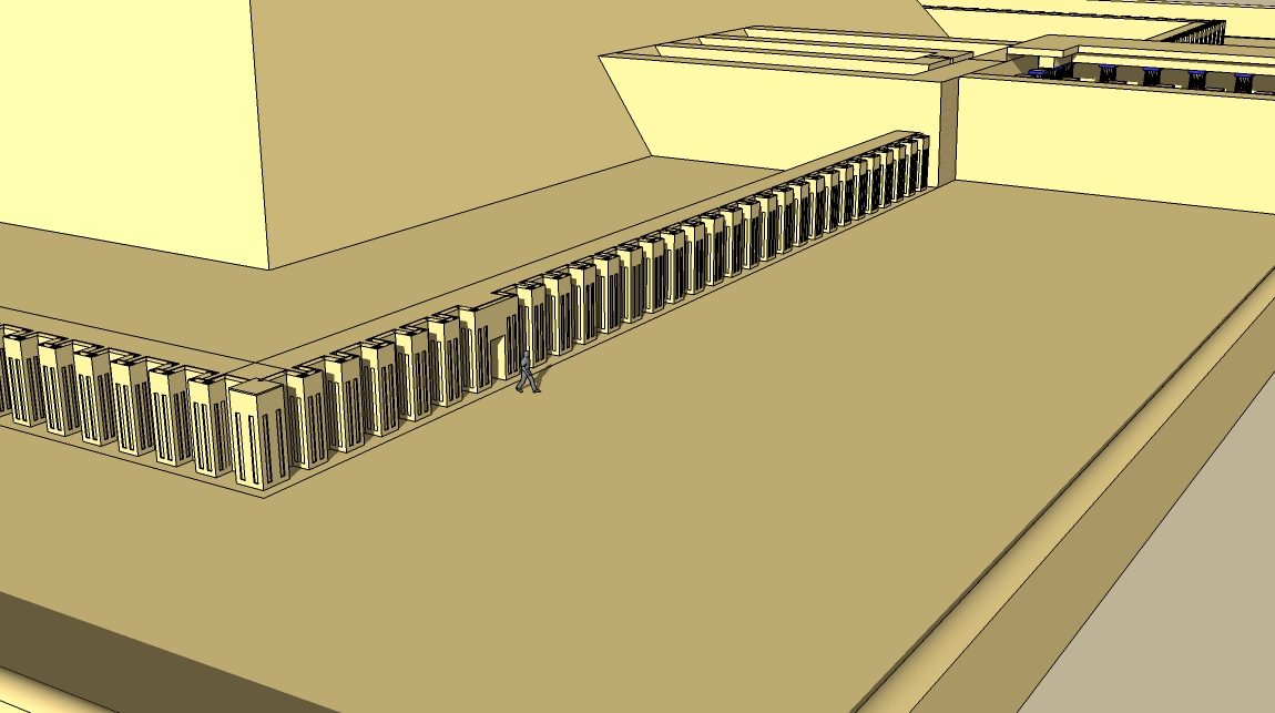 restitution du complexe funéraire d'amenemhat III à Dahchour